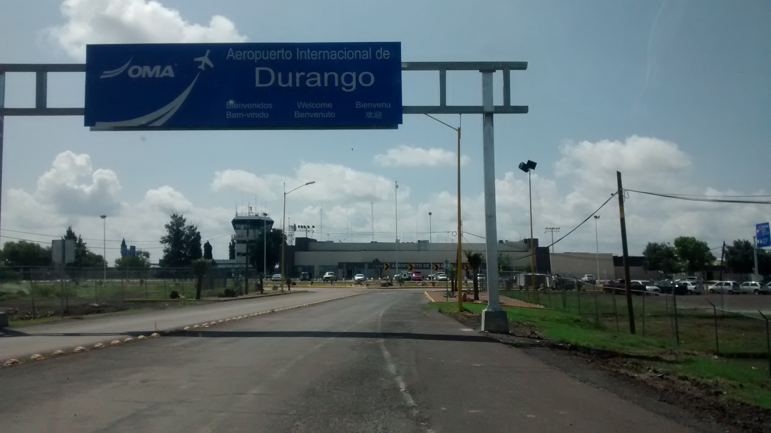 Entrada al aeropuerto de Durango